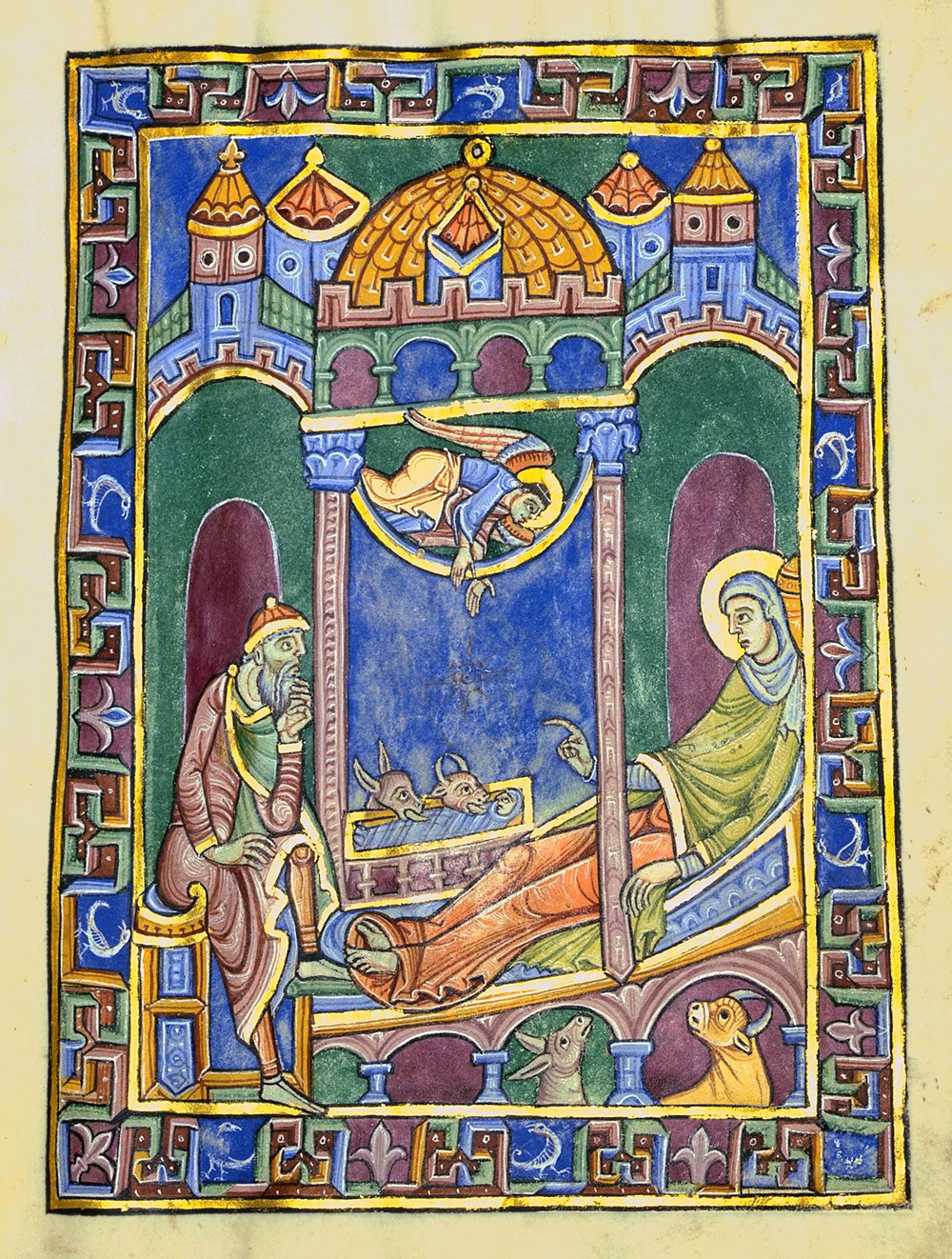 Geburt Christi. In: Albani-Psalter